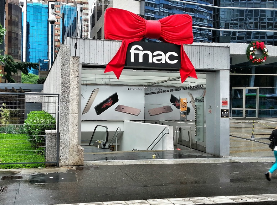 Loja subterrânea da Fnac na Avenida Paulista, São Paulo. créditos da imagem: Ladislau Almeida.